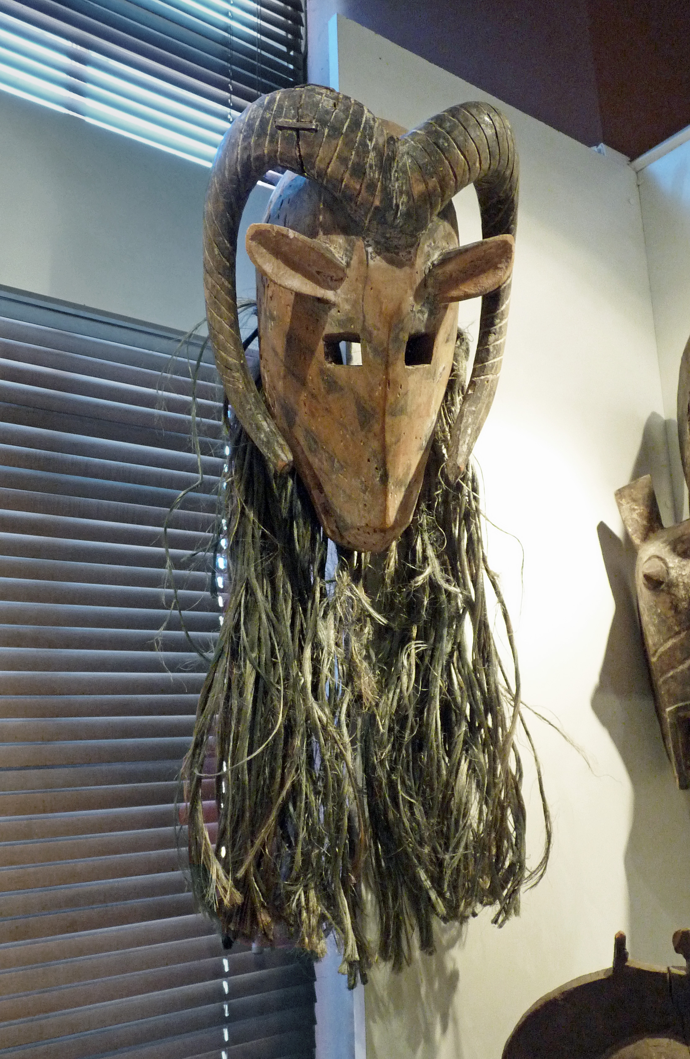 Masque Bobo. Bois, pigments, fibres végétales. Burkina Faso. Musée barrois